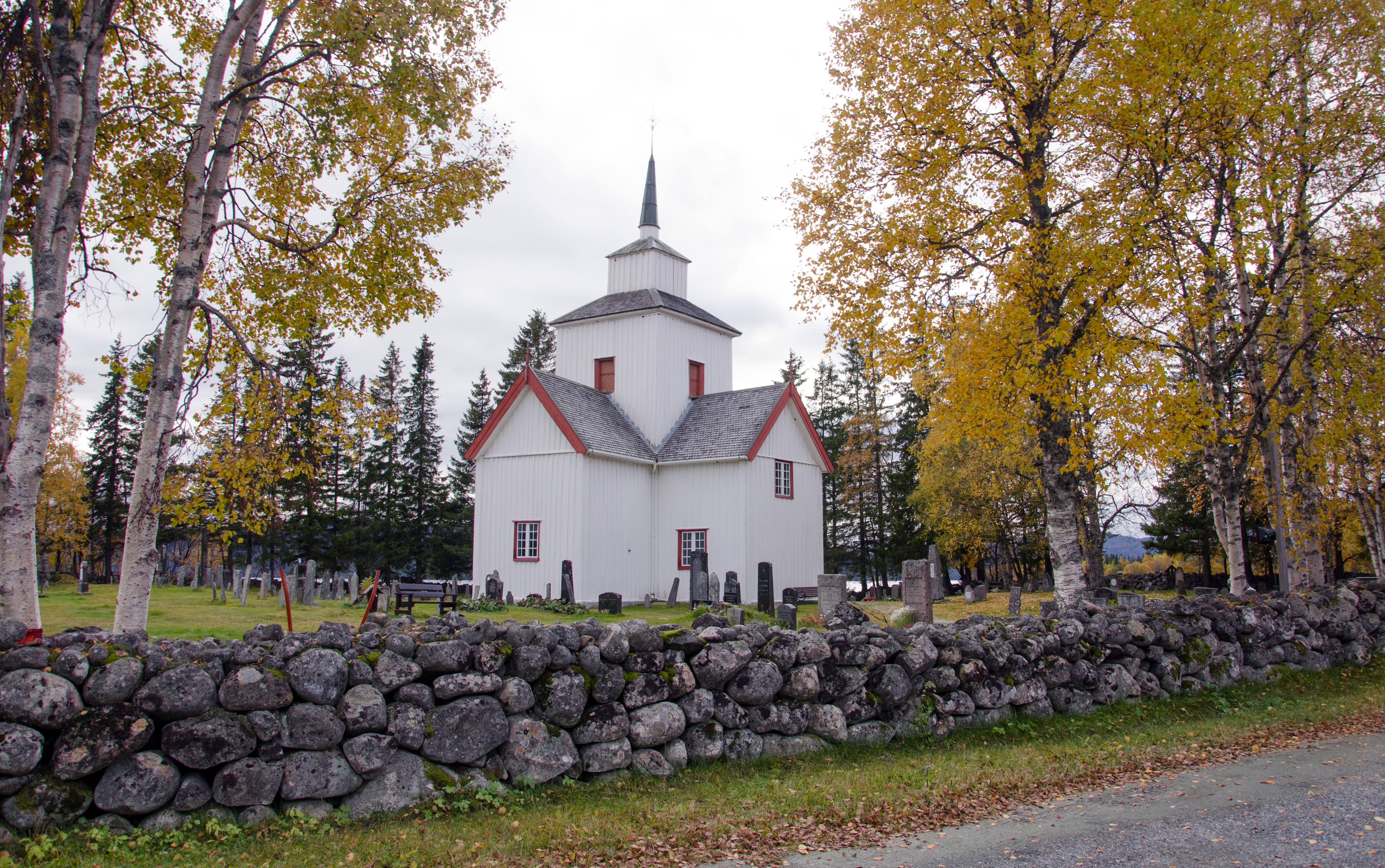 Rauland kirke